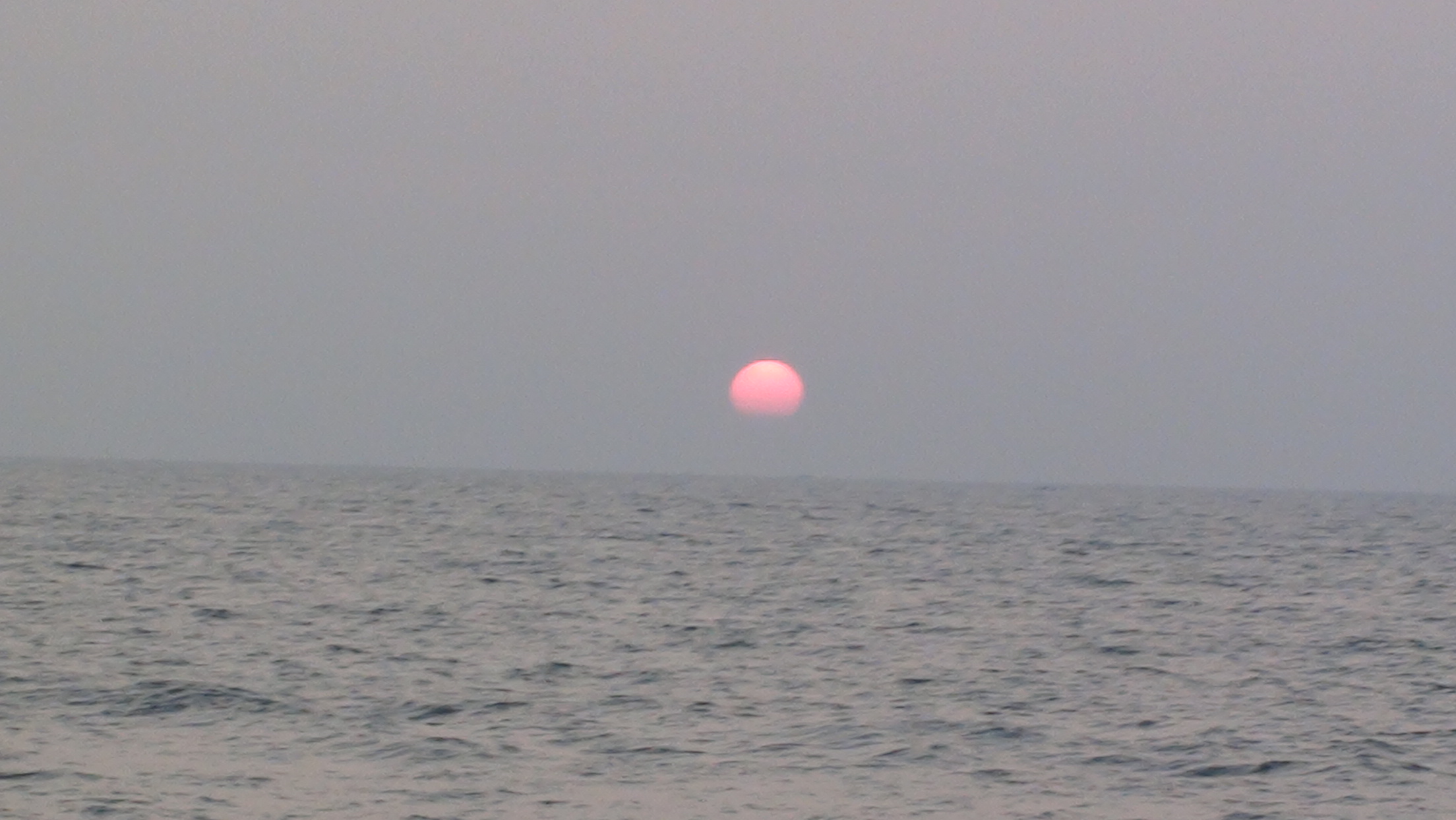 Sunset at Kozhikode beach